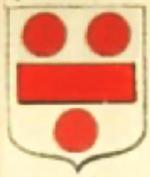 Blason de la Famille Boudin, XIIe siècle, en Normandie.